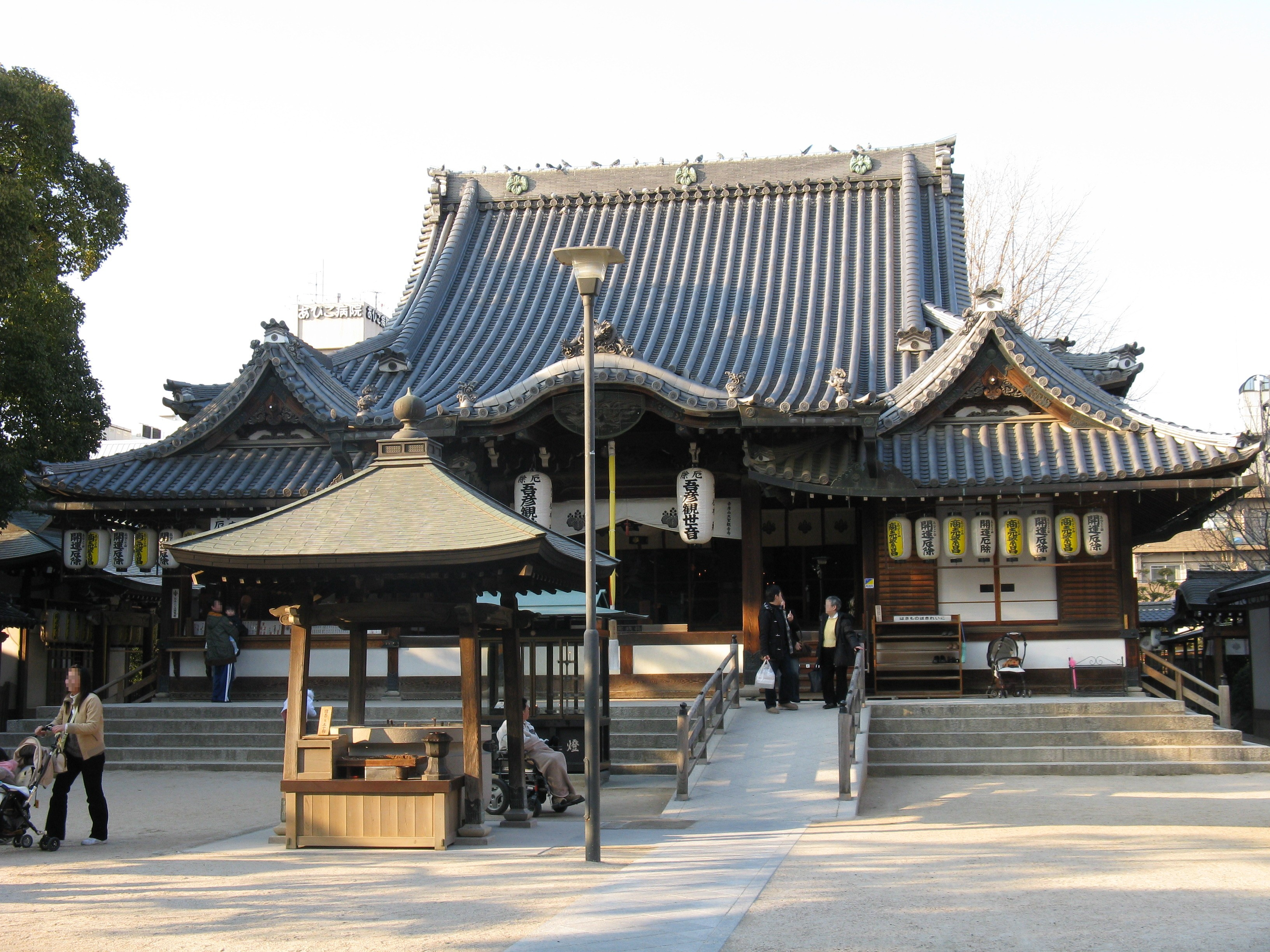 大聖観音寺（吾彦観音寺）本堂